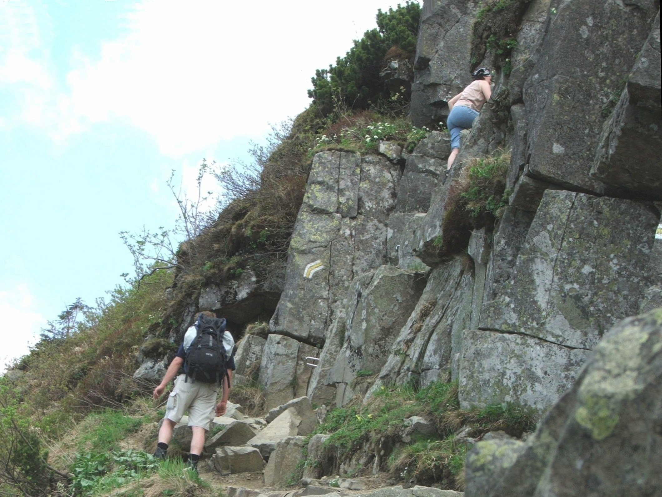 Babia Góra. Szlak turystyczny "Akademicka perć.